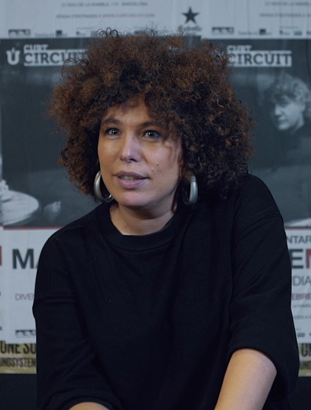 Arista: Silvia Cruz Autora: El Bloque TV Detalles: Sala Apolo, Barcelona. Febrero 2018